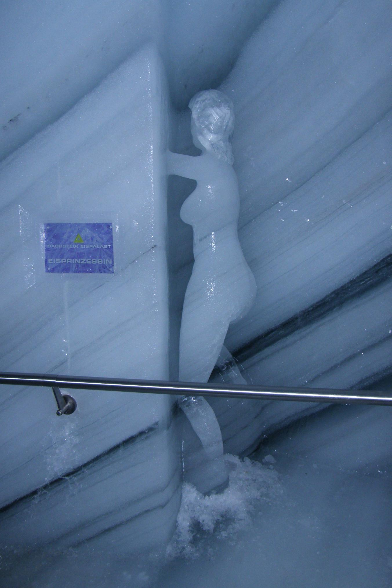 Dachstein Eispalast, pałac lodowy